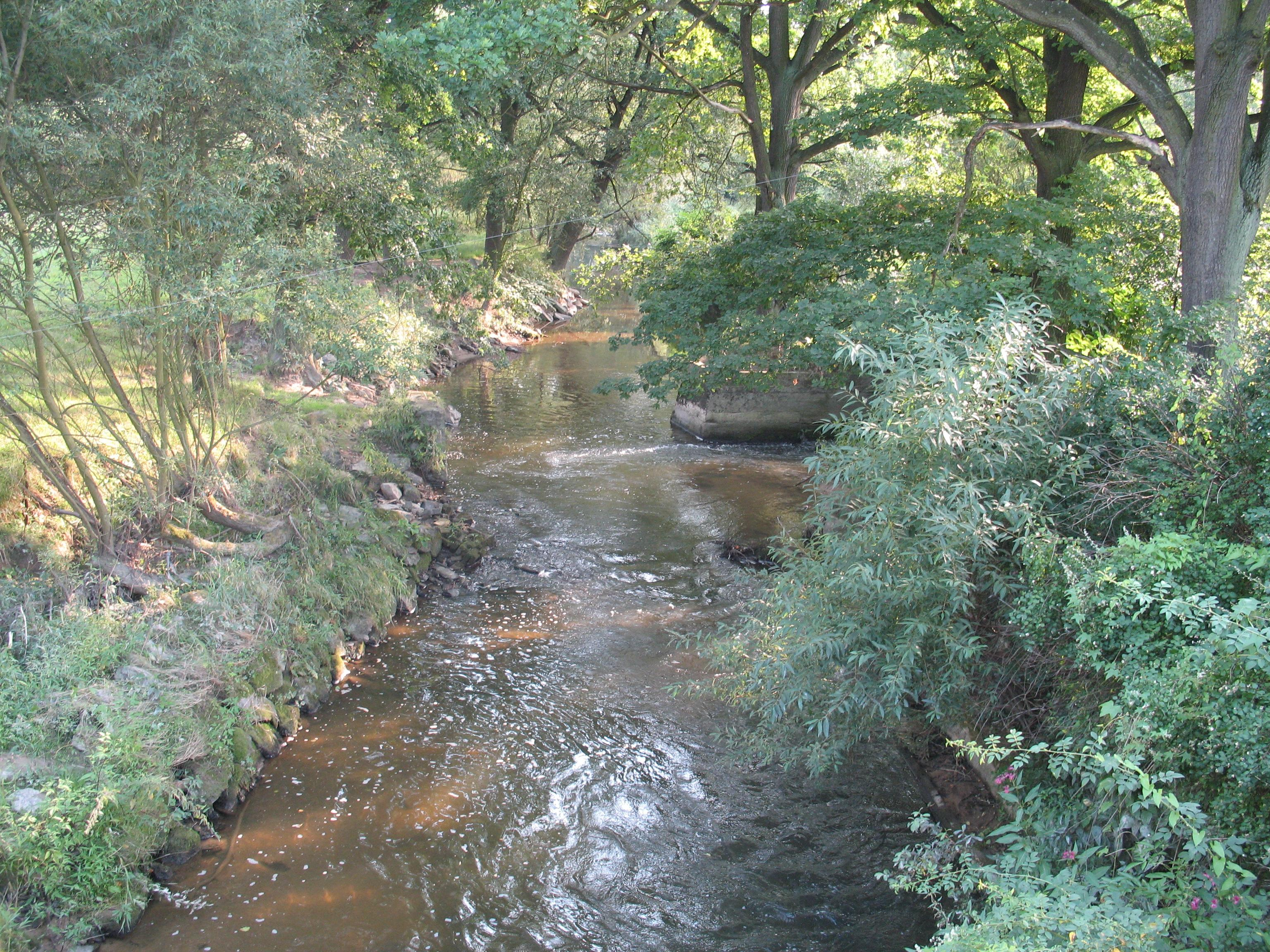 River Smědá near Ves